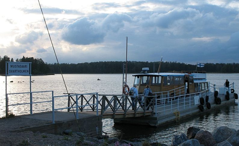 Helsingin Mustasaaren vesibussi ja yhteyslaituri (2006). Huom: Muista säilyttää viittaus kuvaajaan, mikäli käytät kuvaa.